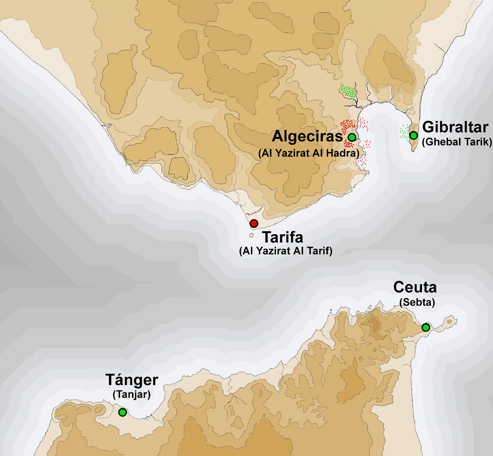 Estrecho de Gibraltar durante el sitio de Algeciras de 1342-1344.